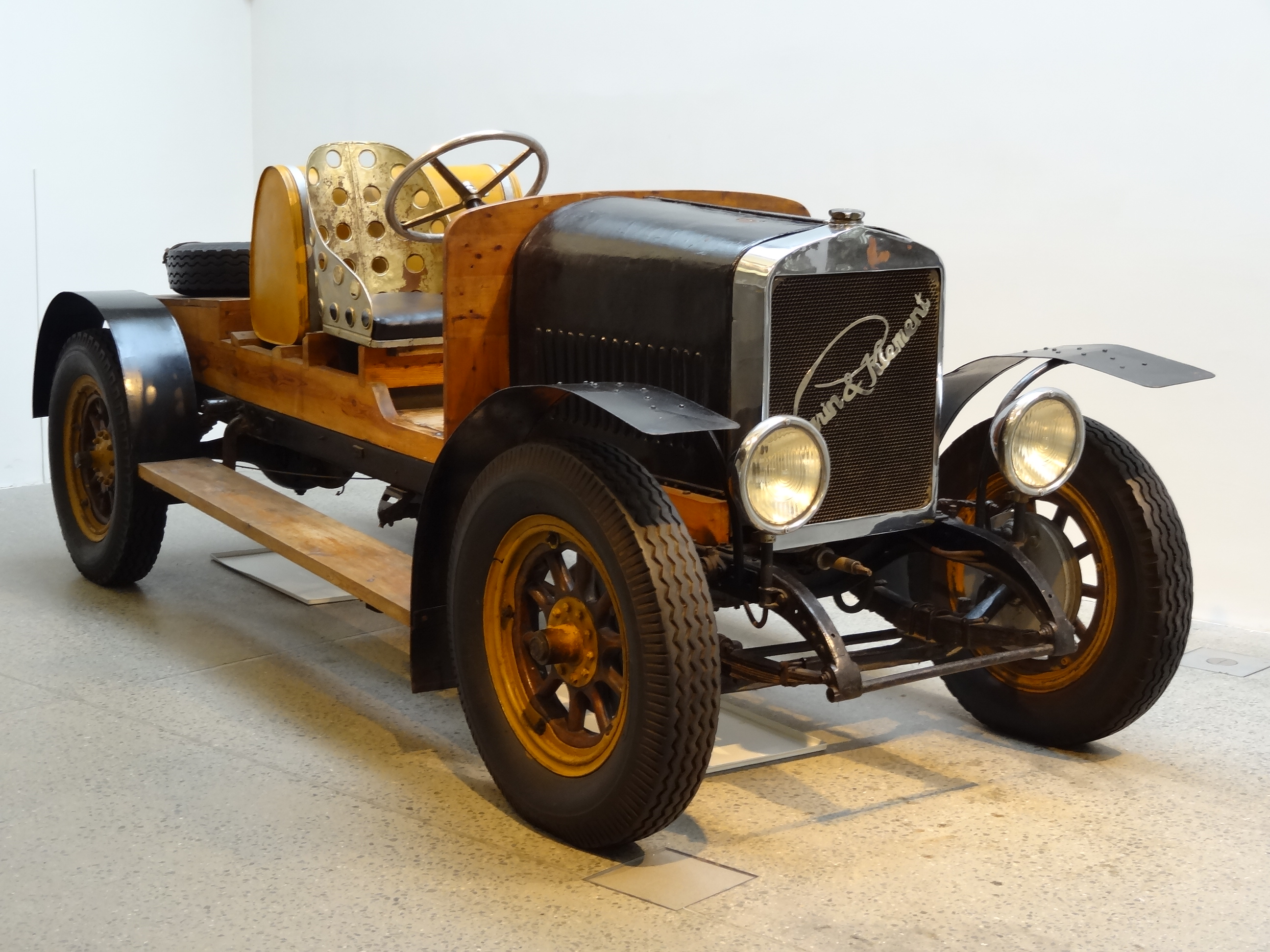 Dědeček automobil, L&K typ 110, 1927